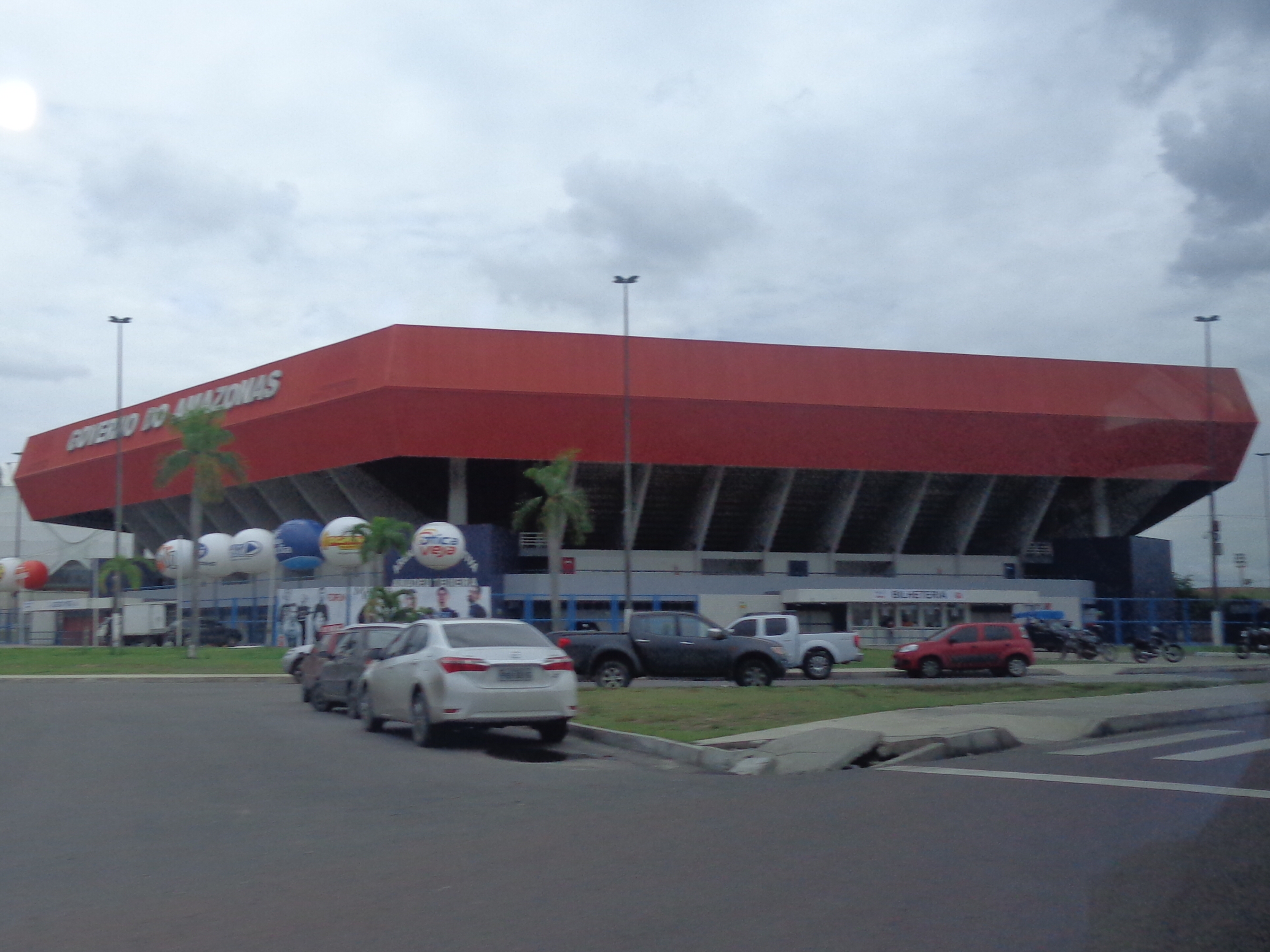 Arena Amadeu Teixeira